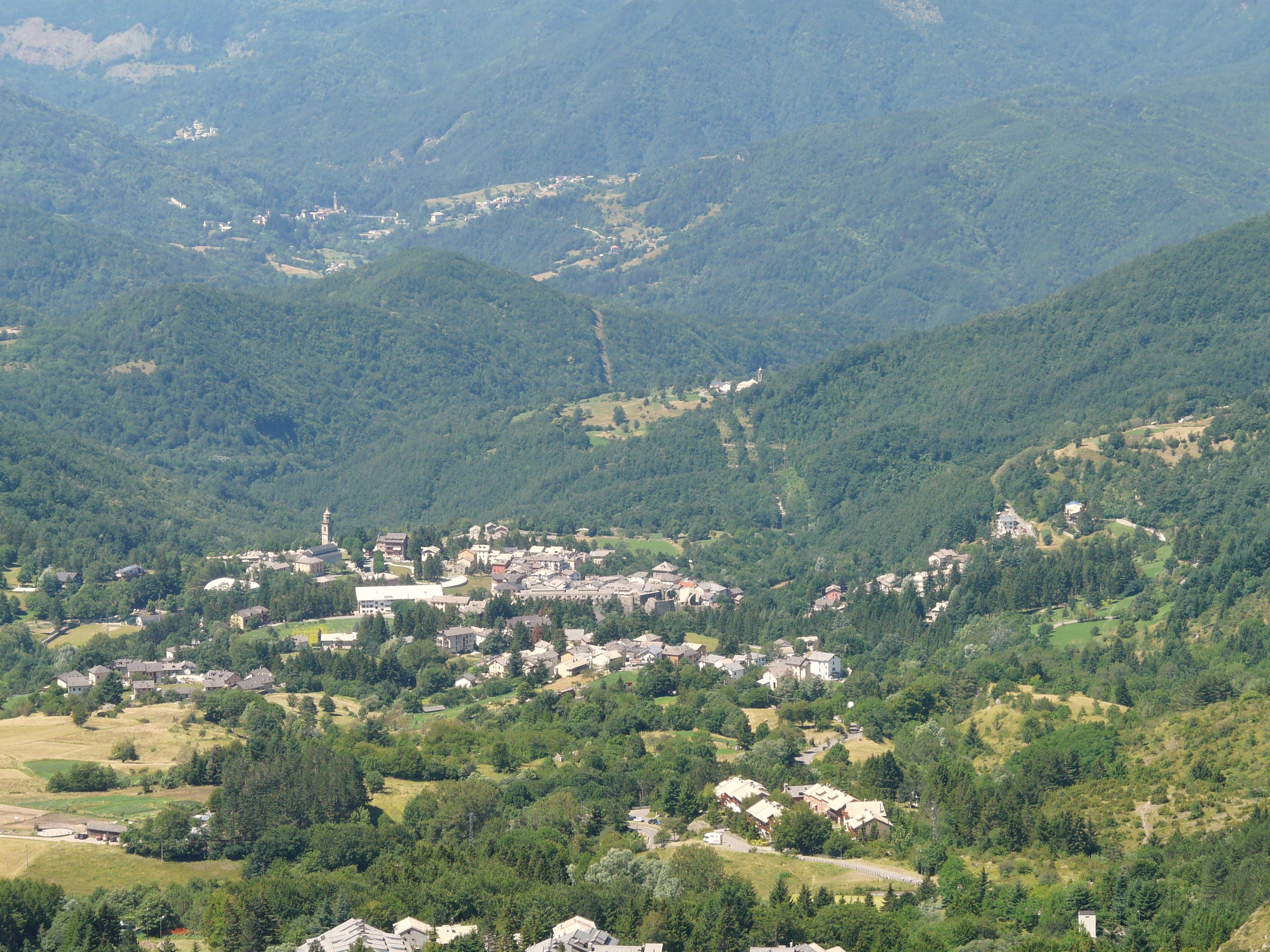 Panorama di Santo Stefano d'Aveto, Liguria, Italia